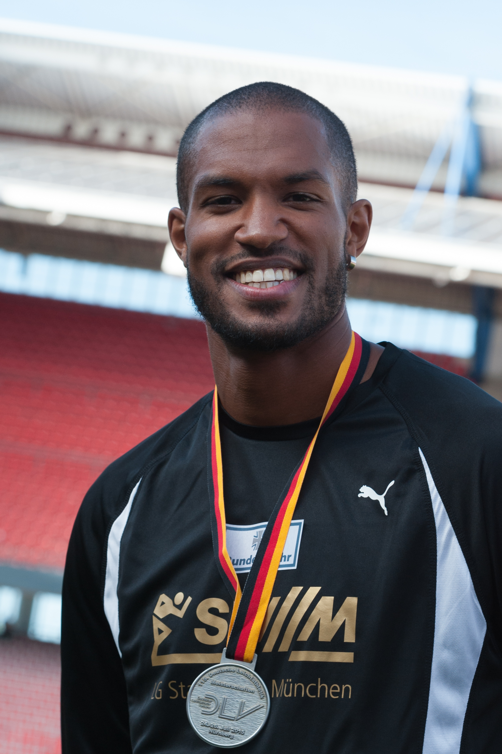 Deutsche Leichtathletik-Meisterschaften 2015: Männer 400m - Kamghe Gaba, LG Stadtwerke München